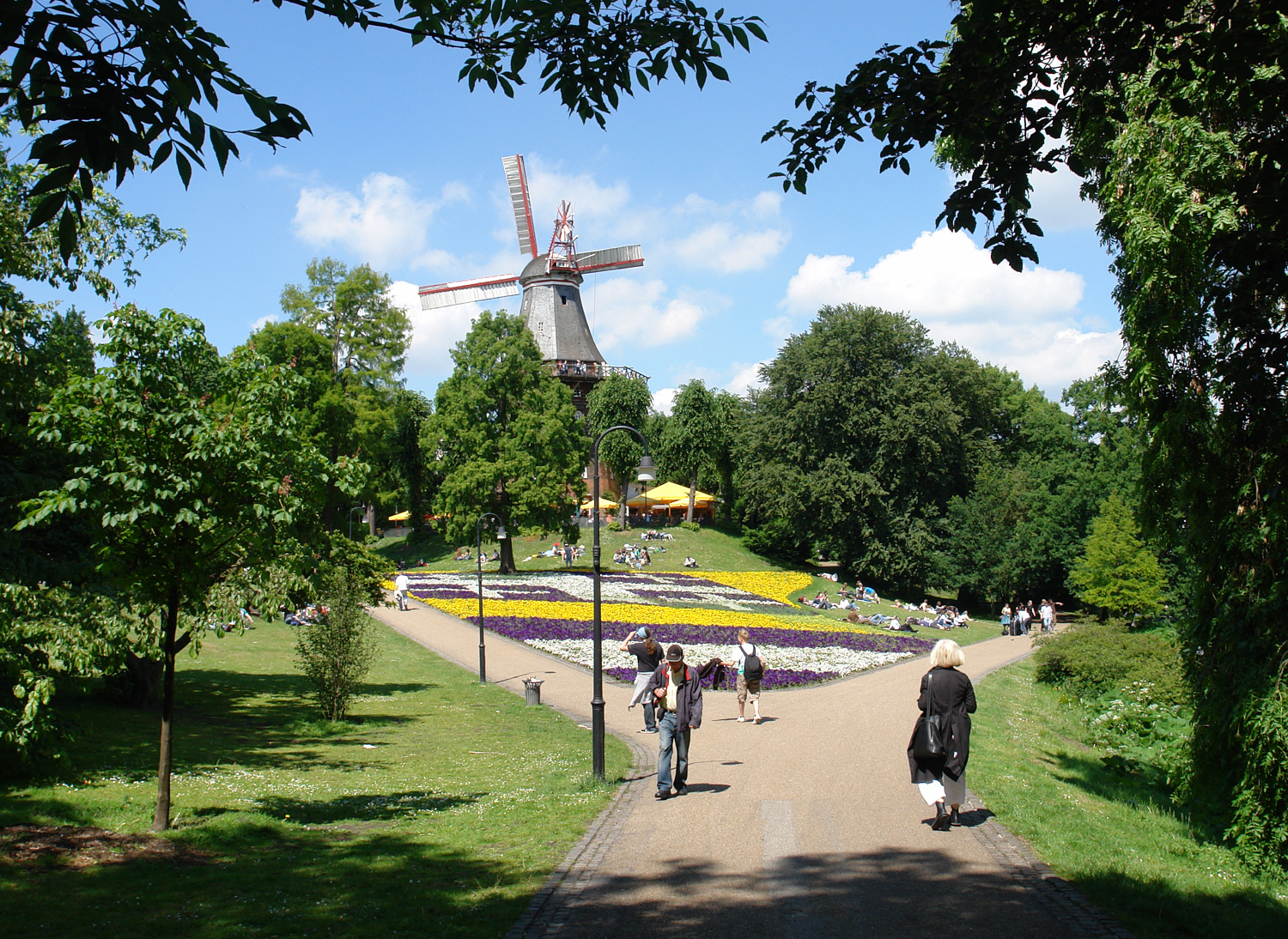 32. Ev. Kirchentag 2009 in Bremen: Mühle in den Wallanlagen. Beete mit dem Kirchentagssymbol